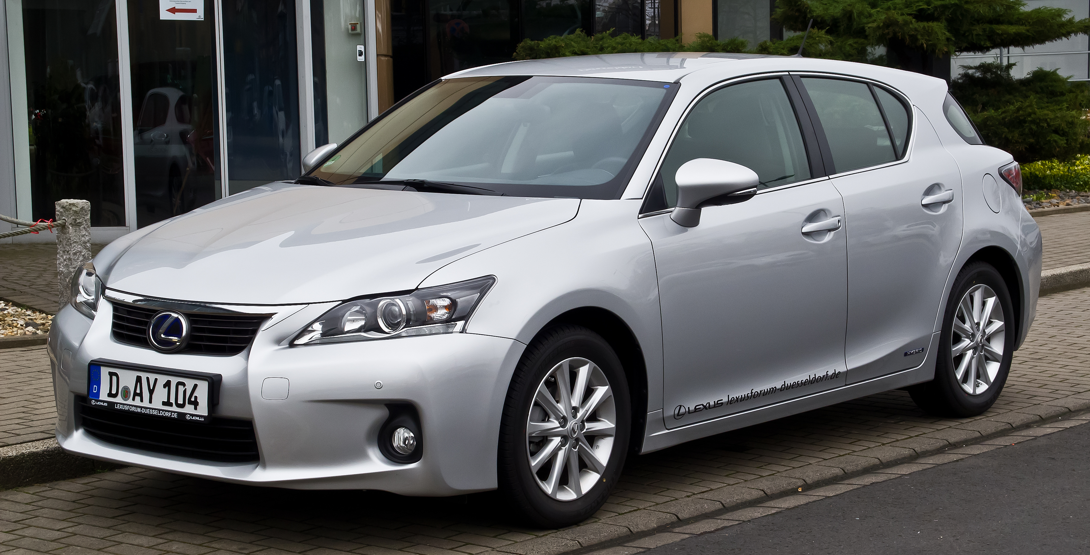 Lexus CT 200h Executive Line (ZWA10)